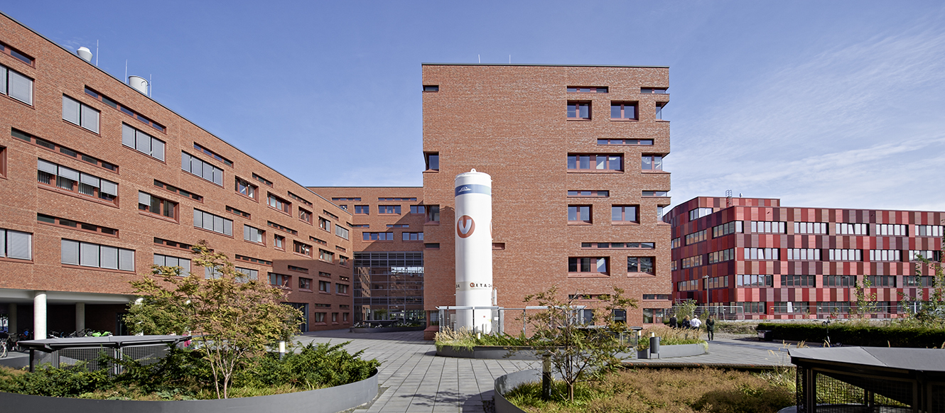 BioCity und BioCube, Firmensitz von Vita 34 in Leipzig.